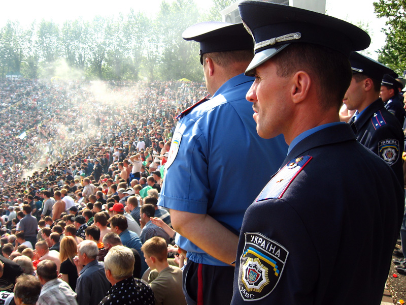 Украинские милиционеры поддерживают порядок во время футбольного матча